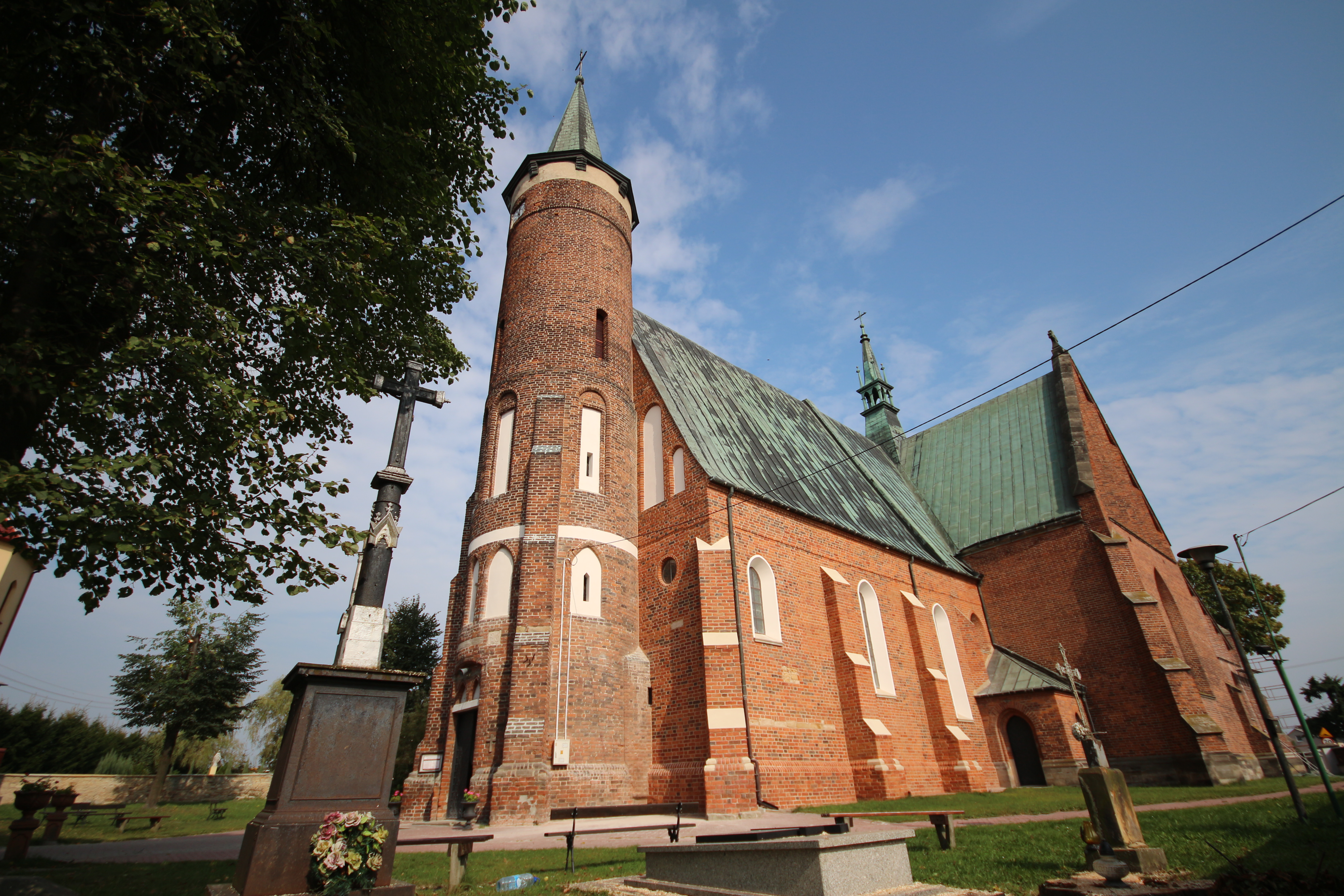 Drzewica, kościół par. p.w. św. Łukasza Ewangelisty, 1460, 1914